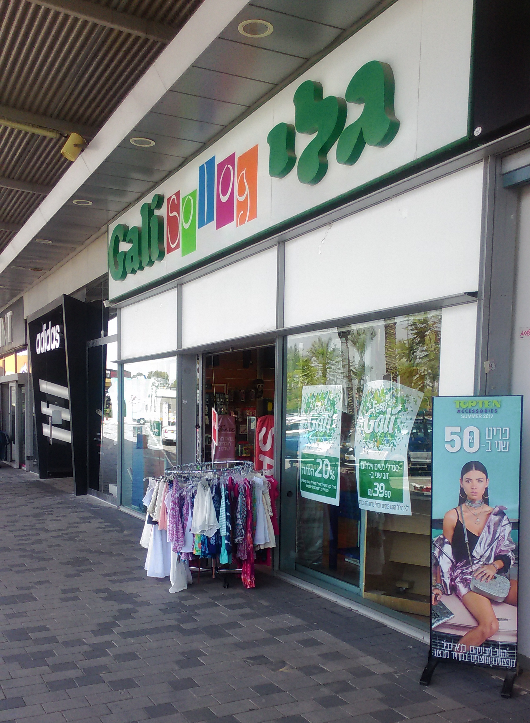 סניף סולוג וגלי